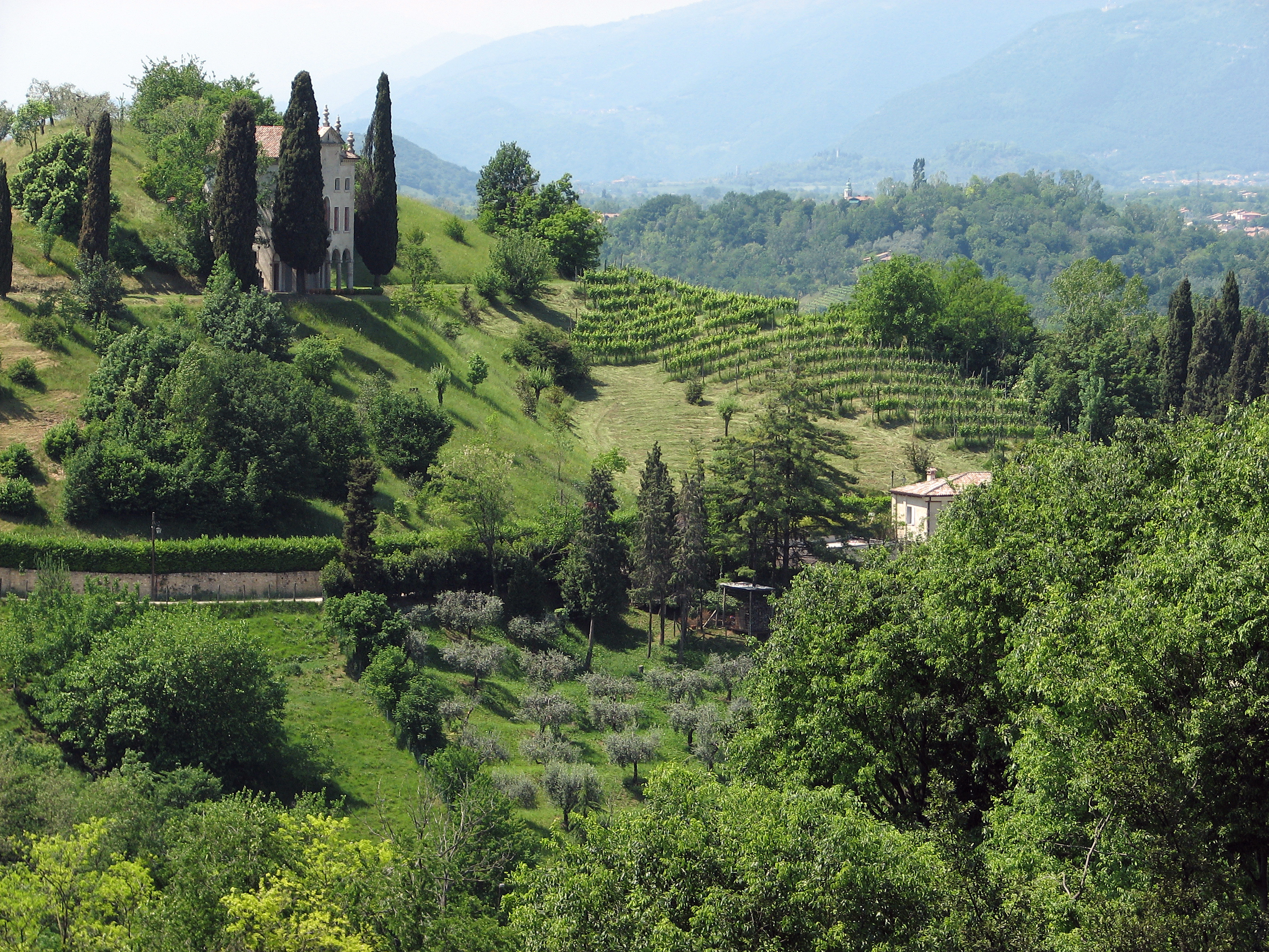 Le colline di Asolo con villa Contarini degli Armeni.